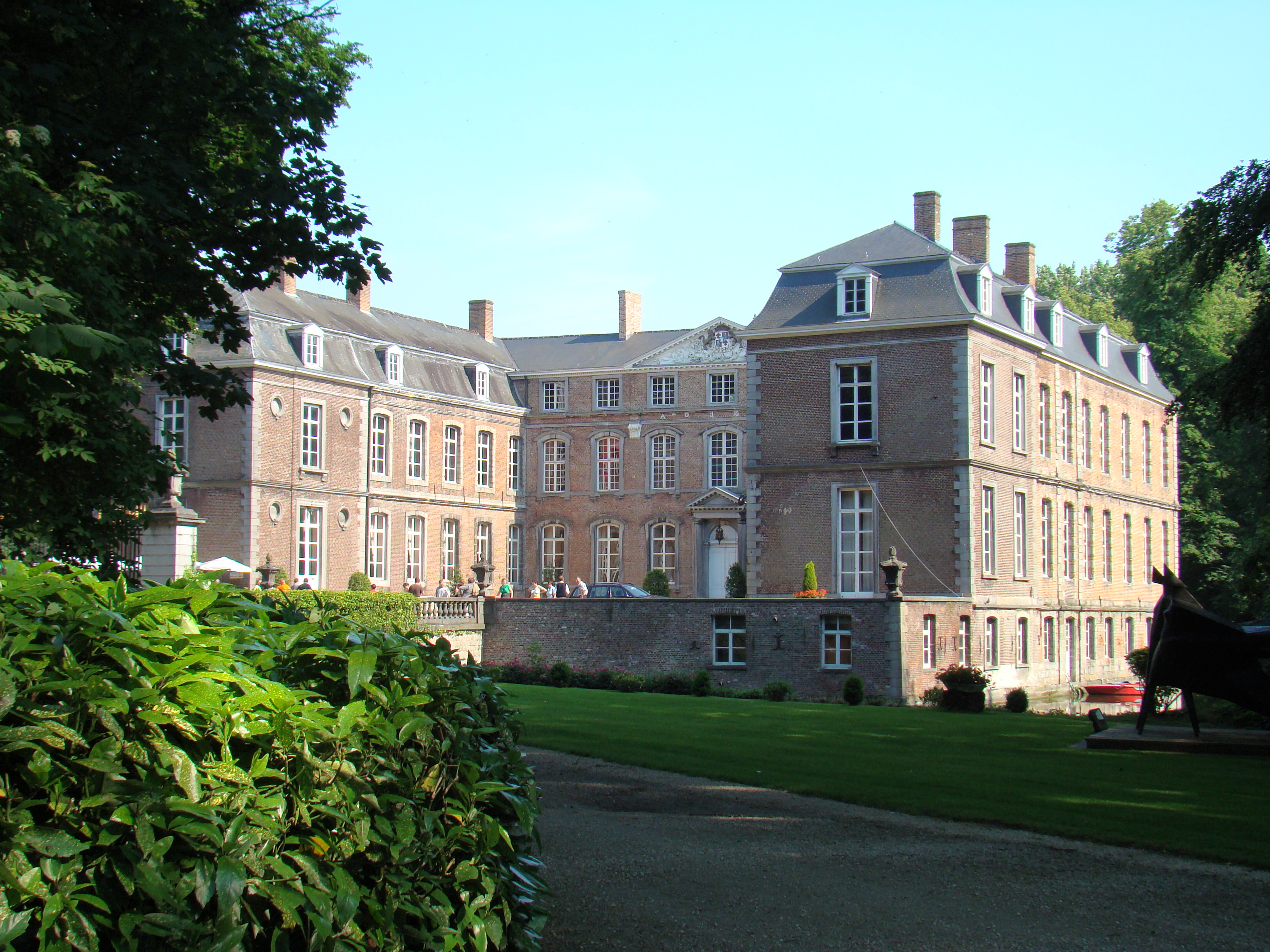 Kasteel naast de markt van Ingelmunster Castle next the market of Ingelmunster, West Flanders, Belgium